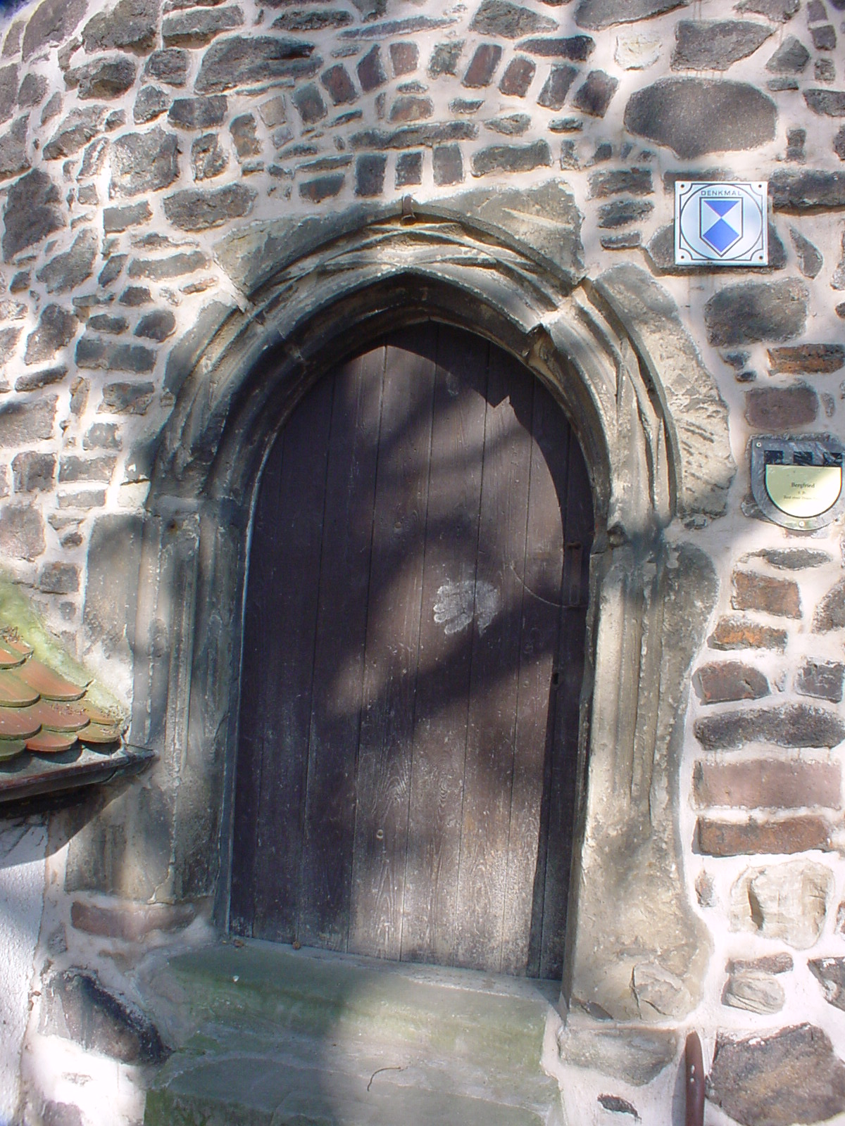 Burg Krosigk 13, ebenerdige gotische Tür zum Bergfried, public domain, Foto von 2004 Mewes 06:59, 14. Apr 2005 (CEST)